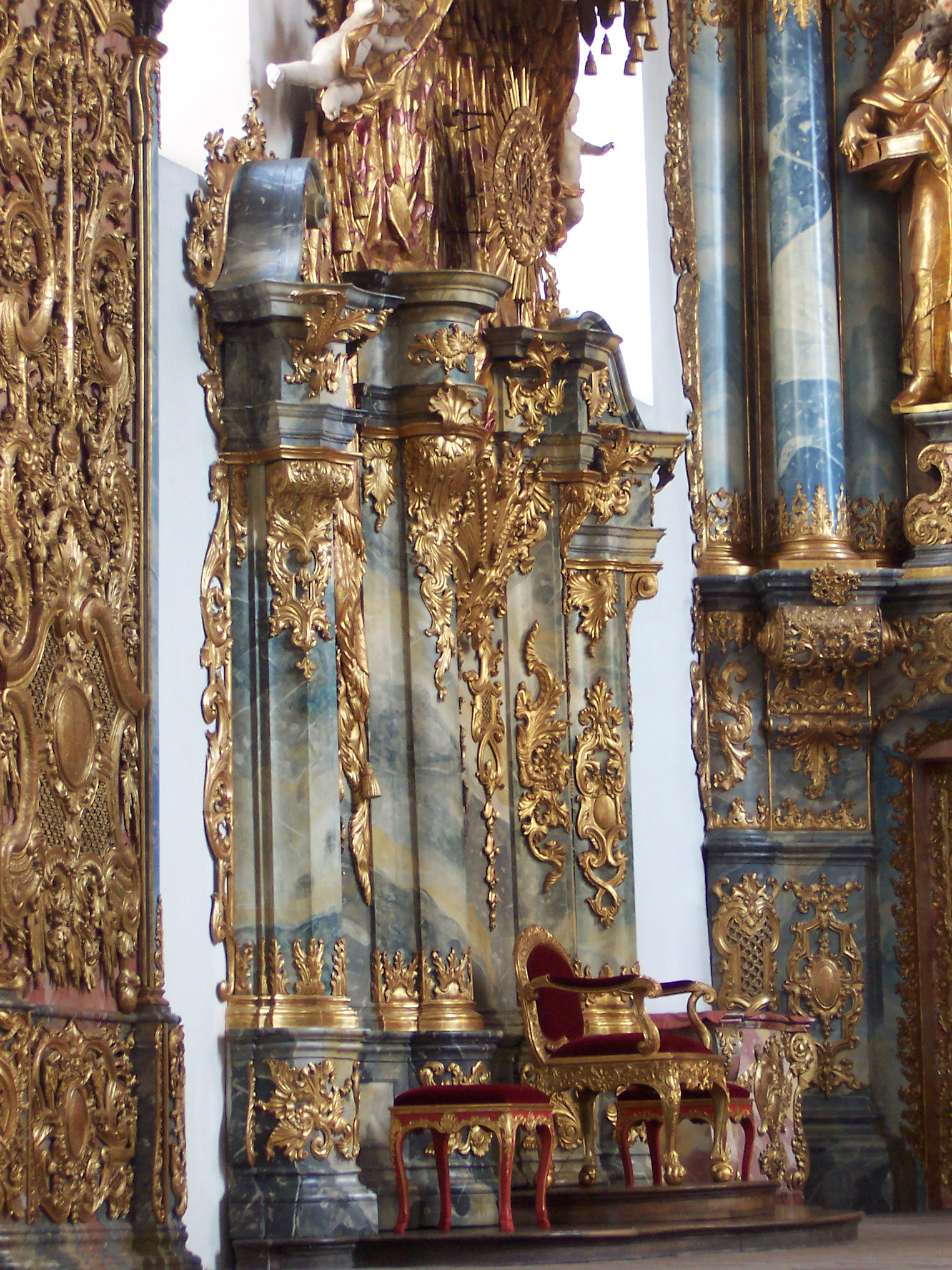 Abstthron im Chor der Klosterkirche in Muri, Kanton Aaargau, Schweiz.